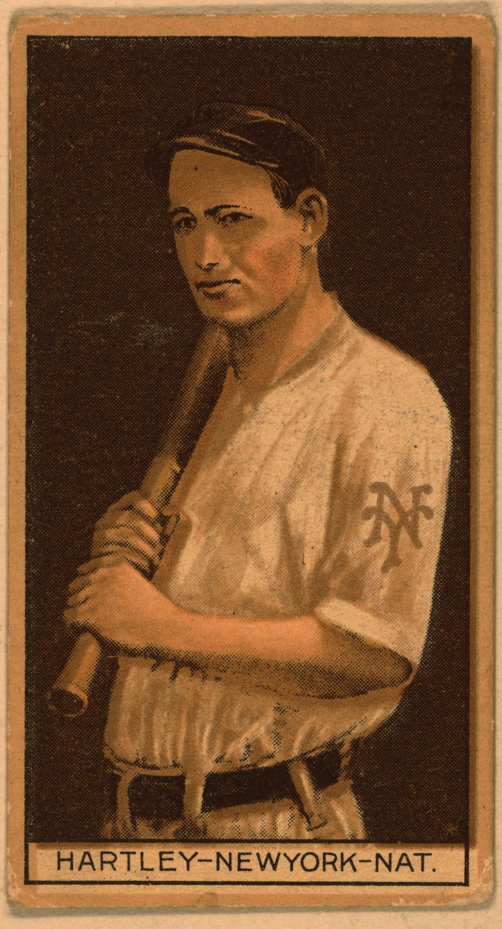 Grover Hartley